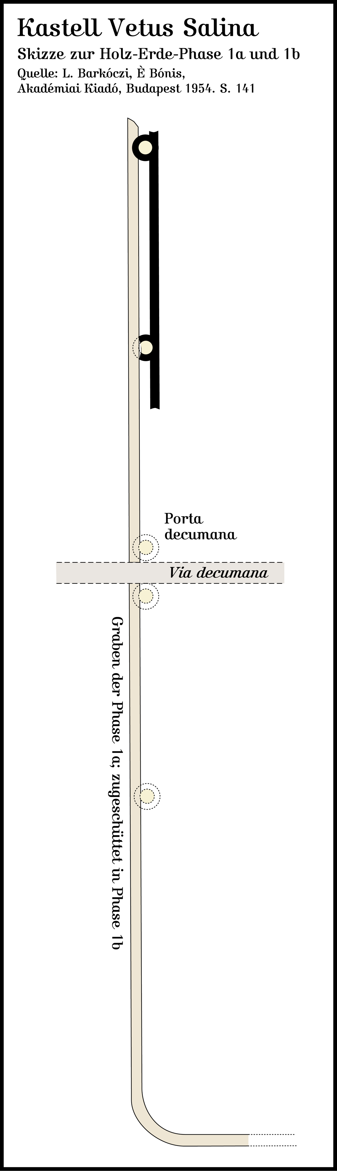 Vetus Salina, Ungarischer Donaulimes. Zeichnung nach: László Barkóczi, È Bónis: Das frührömische Lager und die Wohnsiedlung von Adony (Vetus Salina). In: Acta archaeologica Academiae Scientiarum Hungaricae Nr. 4. Akadémiai Kiadó, Budapest 1954, S. 141.